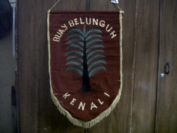 bendera lambang Paksi Buay Belunguh, Pakhu Sukha (pakis hutan)